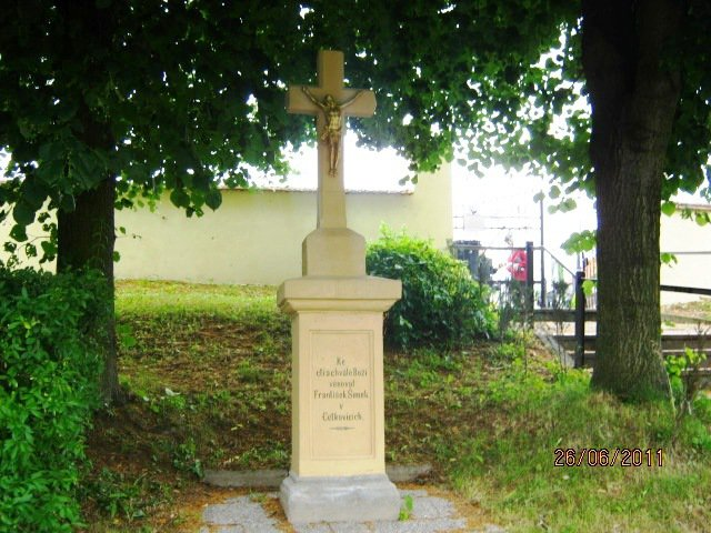 Kříž u hřbitova